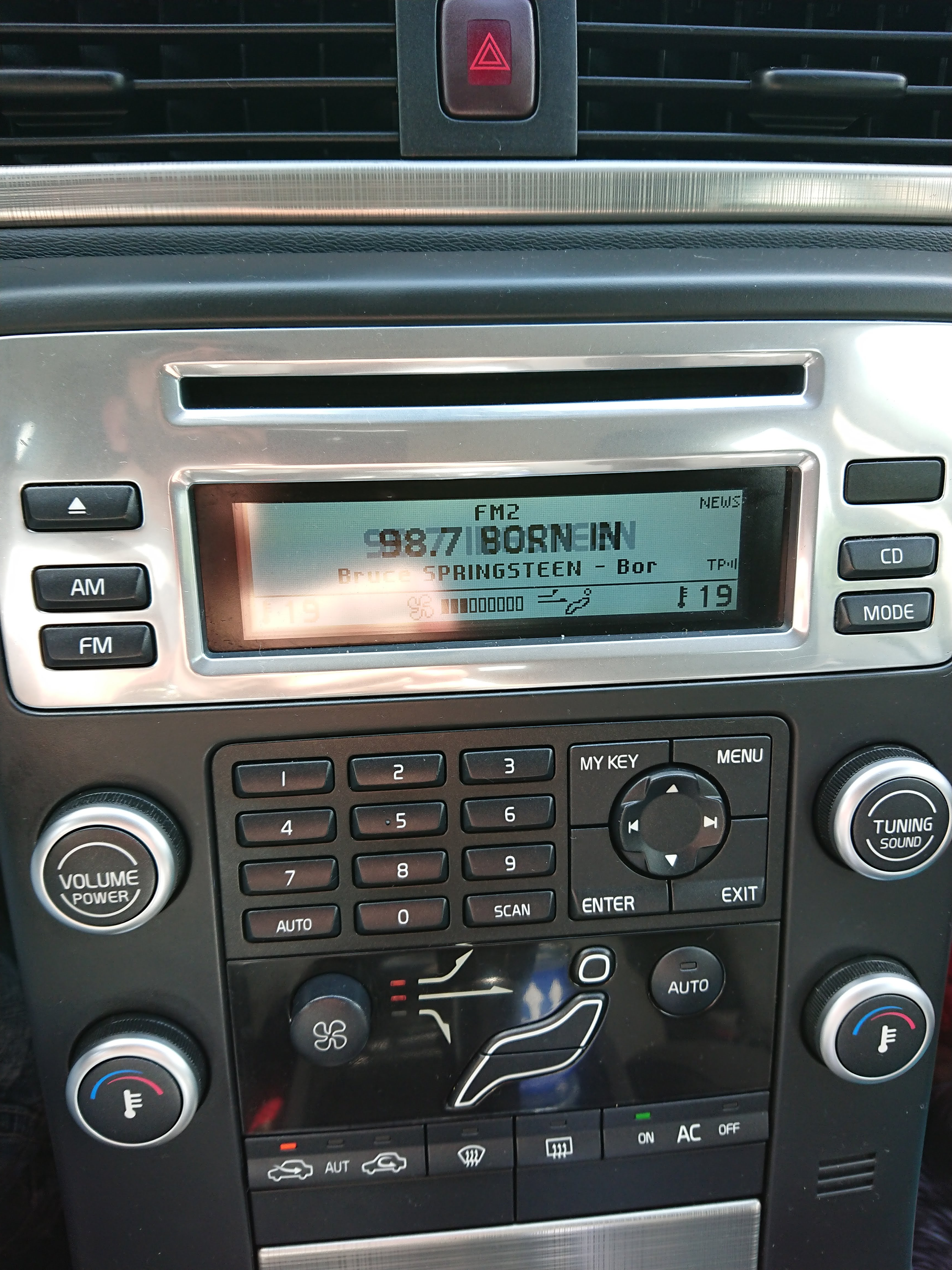 Centrinė konsolė